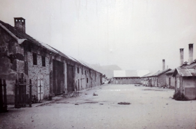 Campo di concentramento di Bolzano 1945 - Blocchi G, H, I, M, di infermeria, cucine, servizi, mensa SS e scorcio del blocco celle